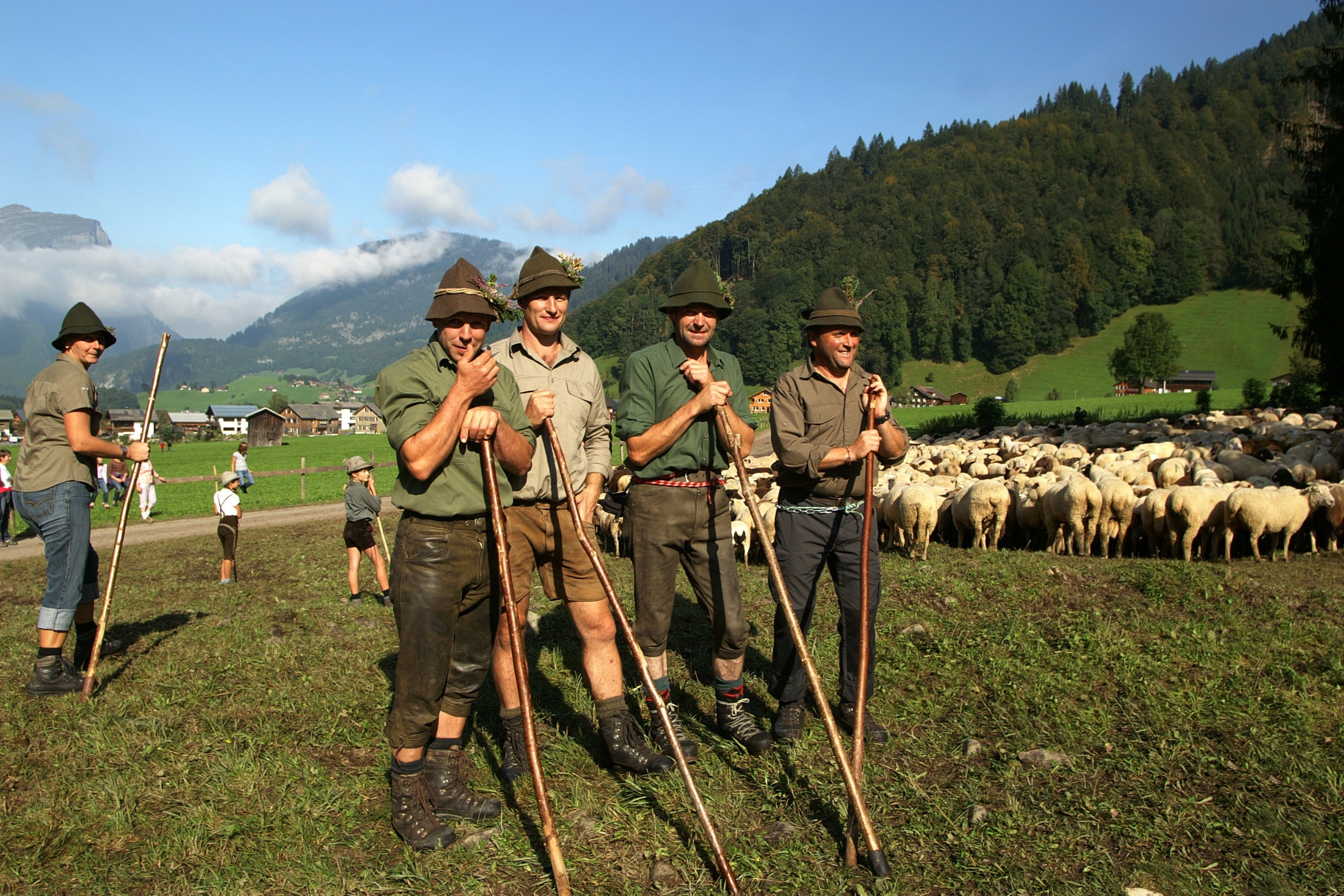 Almabtrieb der Schafe vom Schröcken, Schadona nach Schoppernau im Bregenzerwald Dieses Highlight wird mit dem “Veahmätle” (kleiner Viehmarkt) gefeiert.